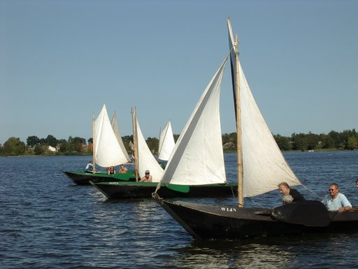 Punters